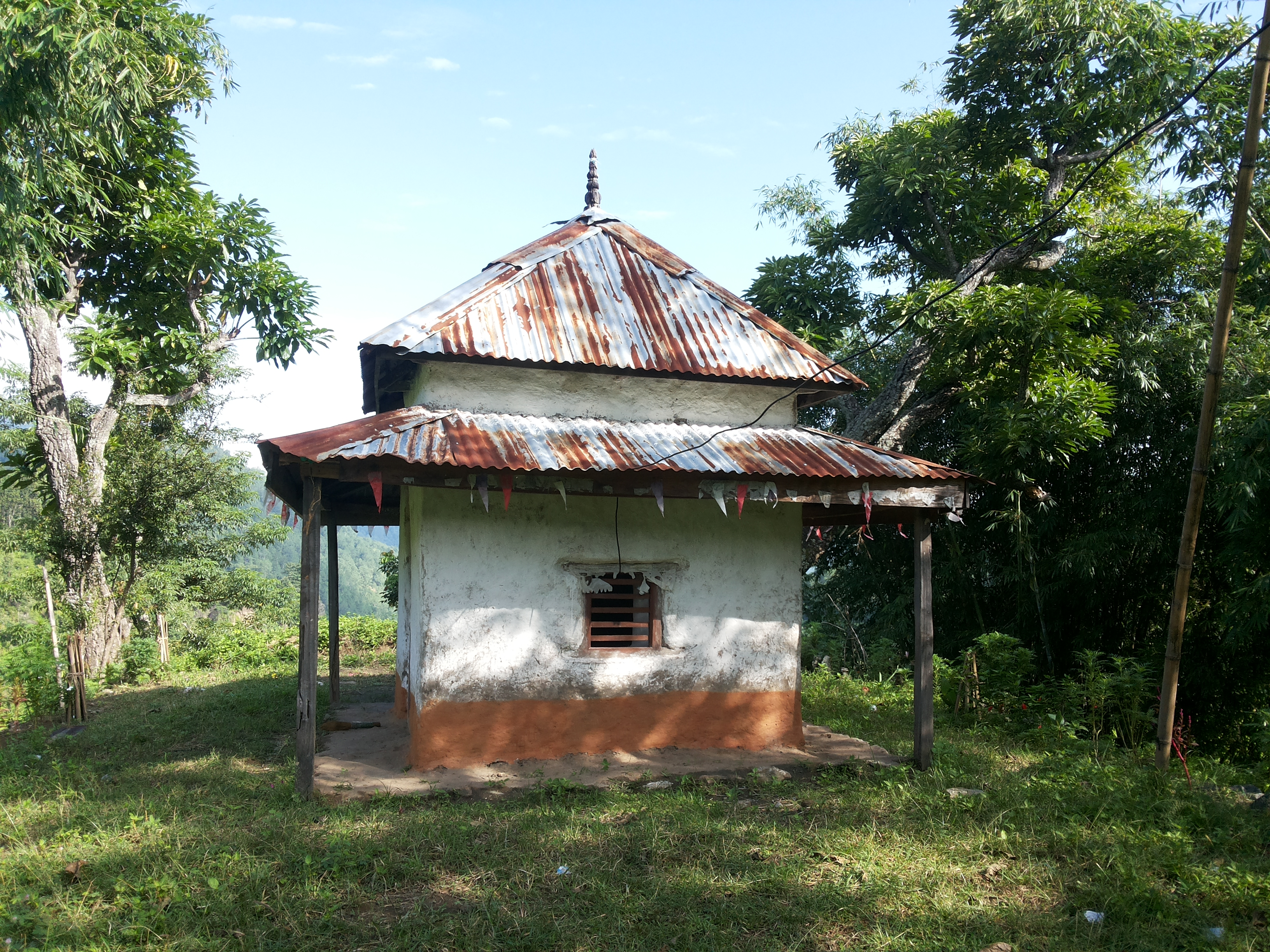 नेपाली: दुम्से किराँतेश्वर महादेव मन्दिर धनकुटा जिल्ला बसन्तटार गाविस अवस्थित अठारसयमा पर्दछ । यहाँ हिन्दू तथा किराँत धर्मावलम्बीहरुले पुजा अर्चना गर्ने गर्दछ्न् । तिज, महाशिवरात्री तथा अन्य अवसरमा यहामेला तथा पुजाआजा हुने गर्दछ ।